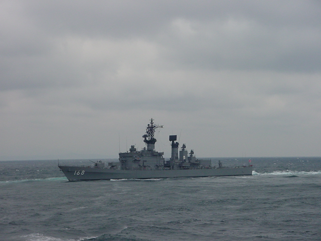 護衛艦「たちかぜ」